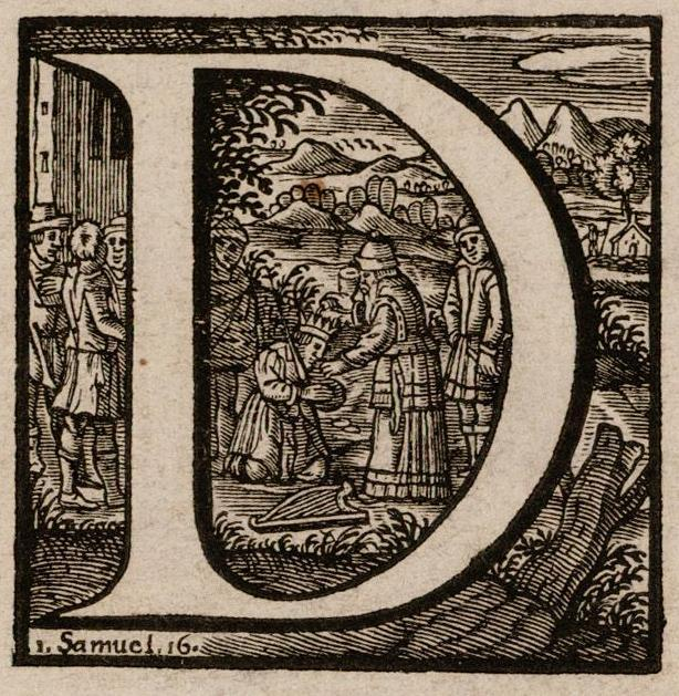 Cornelis Anthonisz (ca. 1505-1553). Vogelvluchtkaart van Amsterdam, detail (David tot koning gezalfd). 1544. Auteur meer dan 70 jaar overleden.